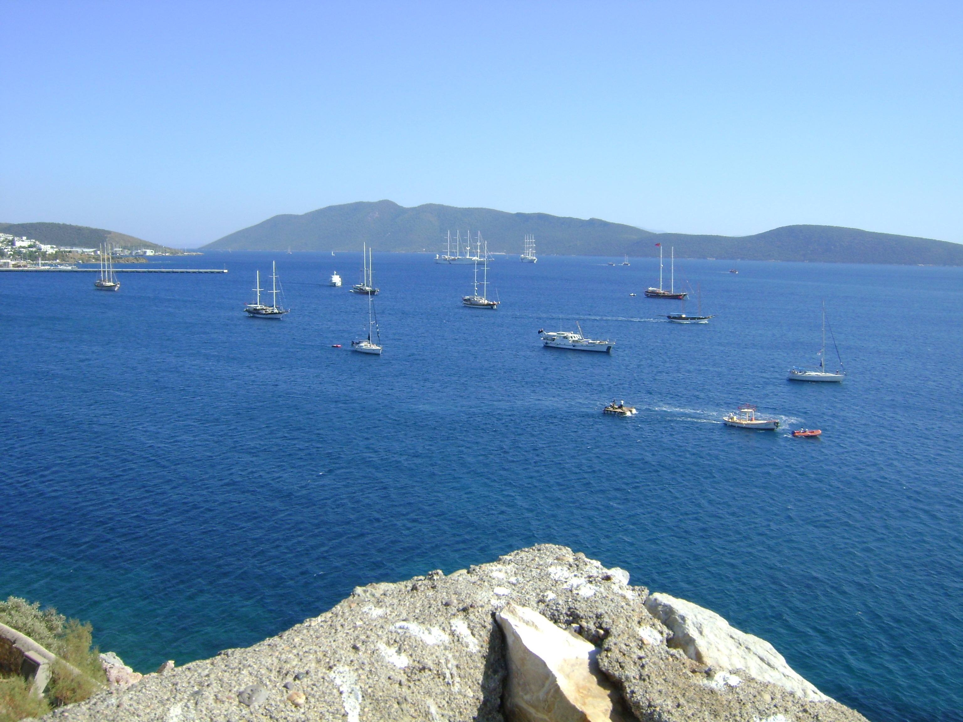 Bodrum 16